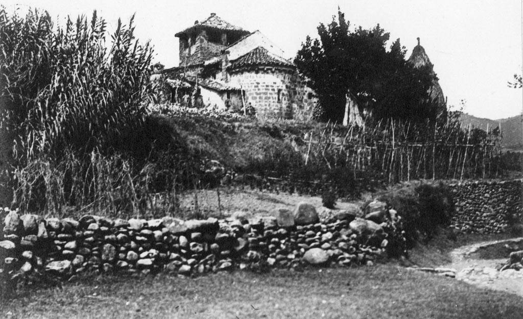 L'església amb un hort de Sant Martí de Solamal. Cèsar August Torras i Ferreri (Entre 1890 i 1923)